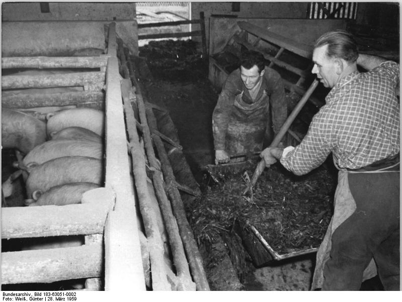 Berlin-Wartenberg, Bauern beim Füttern Zentralbild Weiß 28.3.1959 Wei-Qu. Mehr Milch und Fleisch aus Wartenberg. Die Genossenschaftsbauern der LPG "1. Mai" in Berlin-Wartenberg wollen zu Ehren des 10. Jahrestages unserer Republik zusätzlich 23000 kg Milch und 188 dz Schweinefleisch, das sind 5% bzw. 7% des Jahresproduktionsplanes, erzeugen. UBz: Die Schweinemäster Grossmann und Schwebe (links) werden in diesem Jahr jeden 20 bzw. 25 dz Schweinefleisch über den Plan erzeugen ohne zusätzliches Futtermittel zu beanspruchen. Sie gehören beide der Viehzuchtbrigade an, die auf der VI. LPG-Konferenz als "Brigade der hervorragenden Leistung" ausgezeichnet wurde und jetzt um den Titel "Brigade der sozialistischen Arbeit" kämpft."